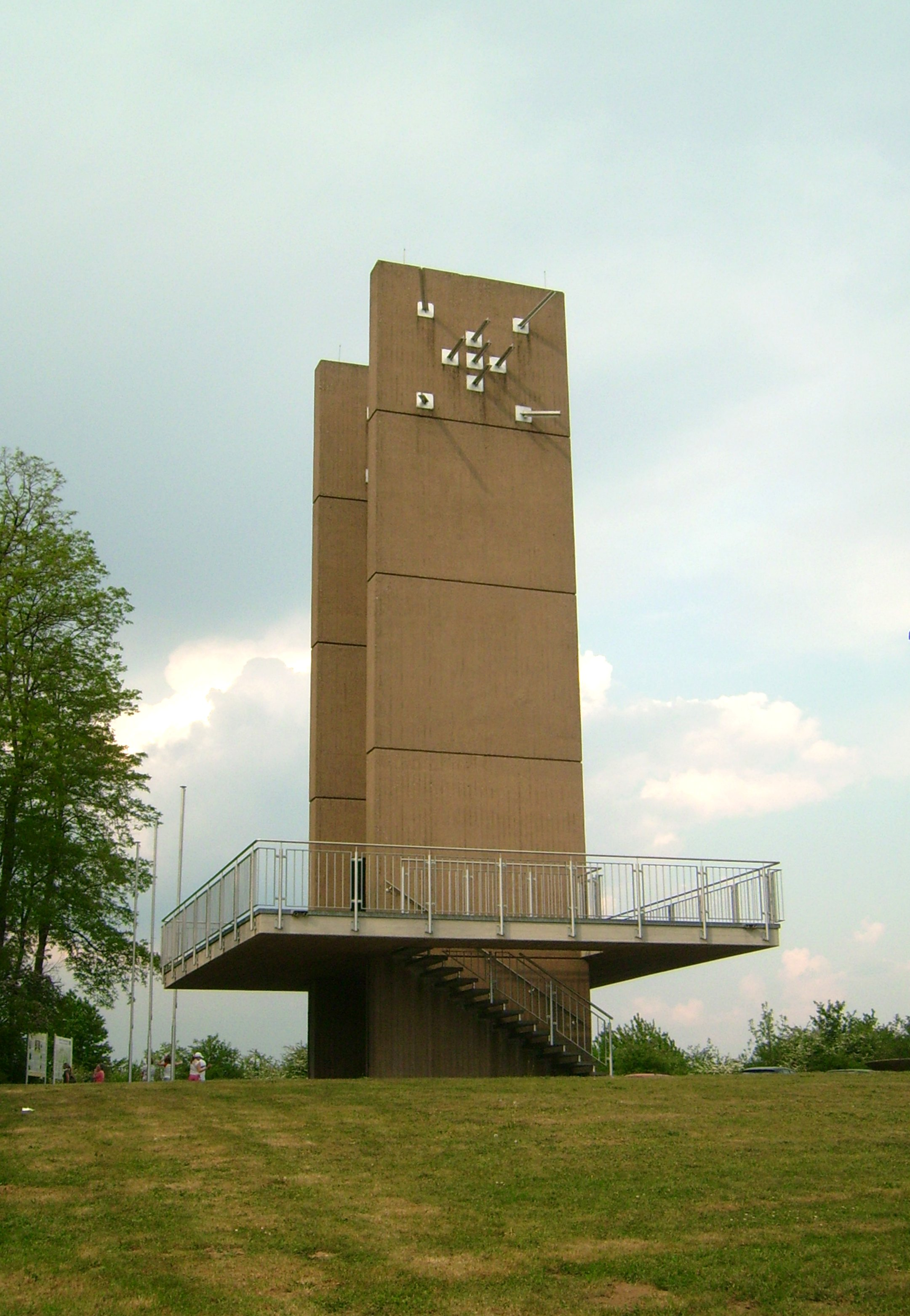 Europadenkmal bei Berus